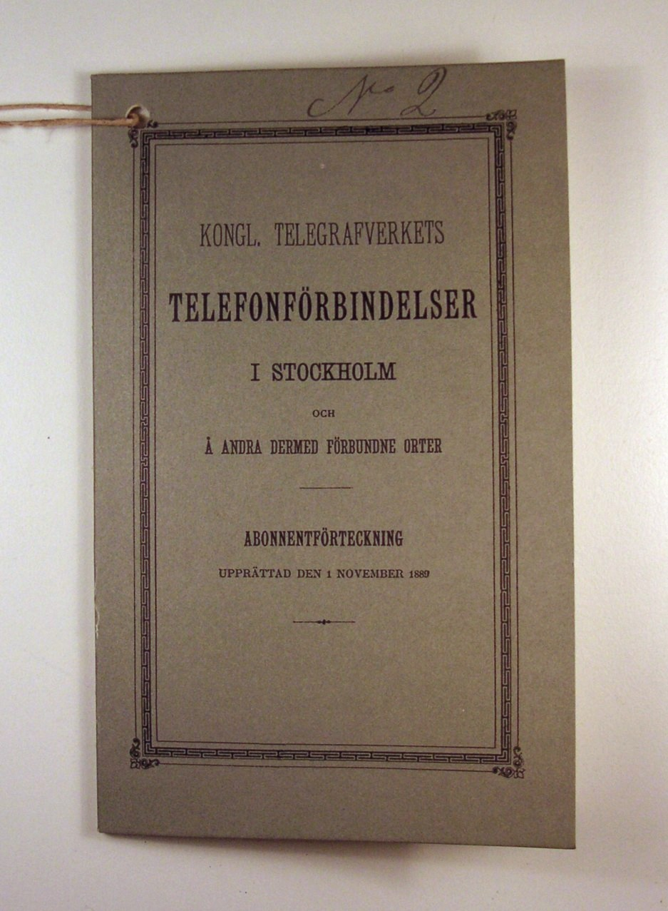 Schwedisches Telefonbuch von 1889 Svensk telefonkatalog från 1889